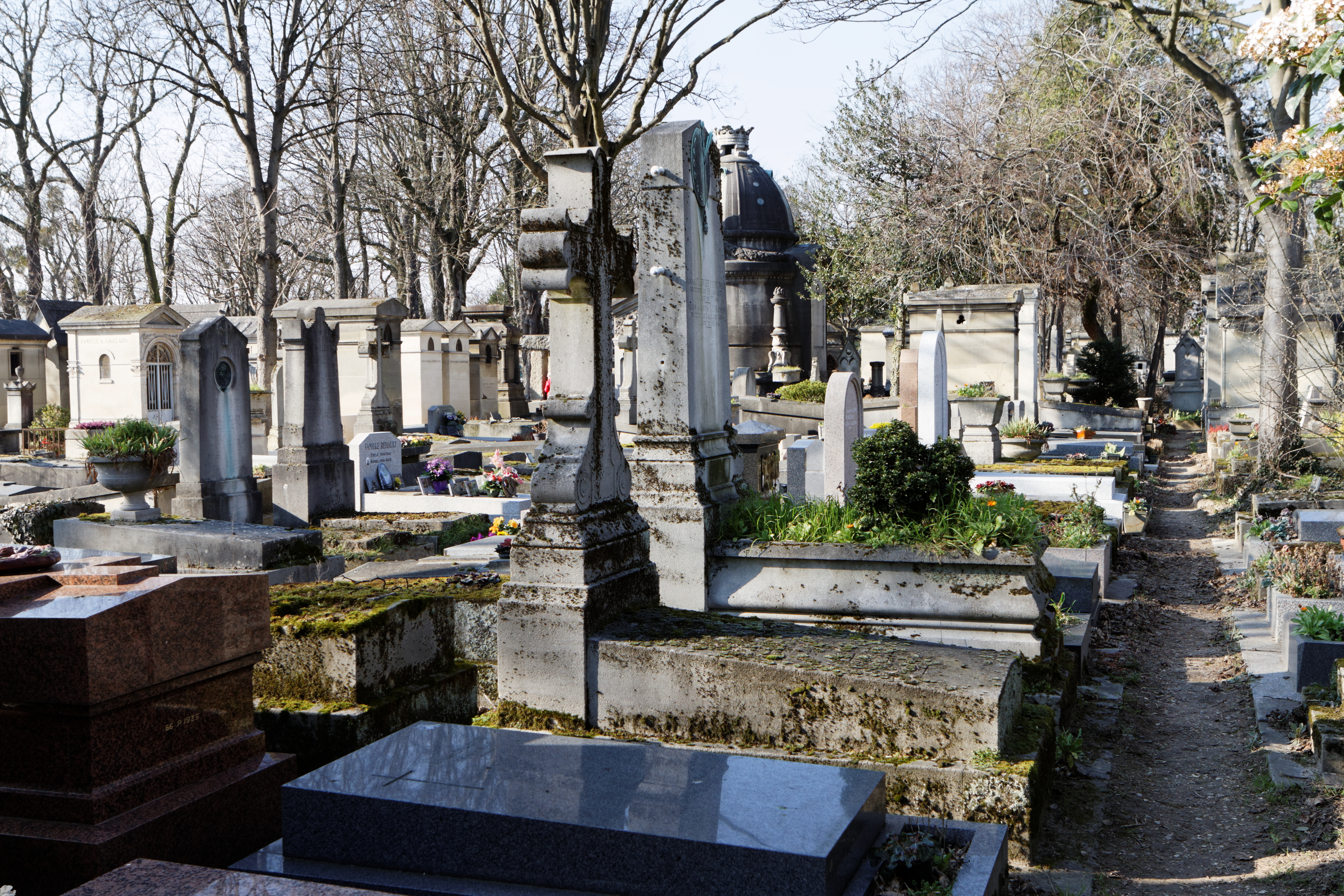 Cénotapge de Georges Delerue (1925-2001), compositeur et musicien, spécialiste de musiques de films. Il fut l'auteur de la musique de plus de 300 films. Il est enterré au Forest Lawn Memorial Park de Glendale, en Californie.